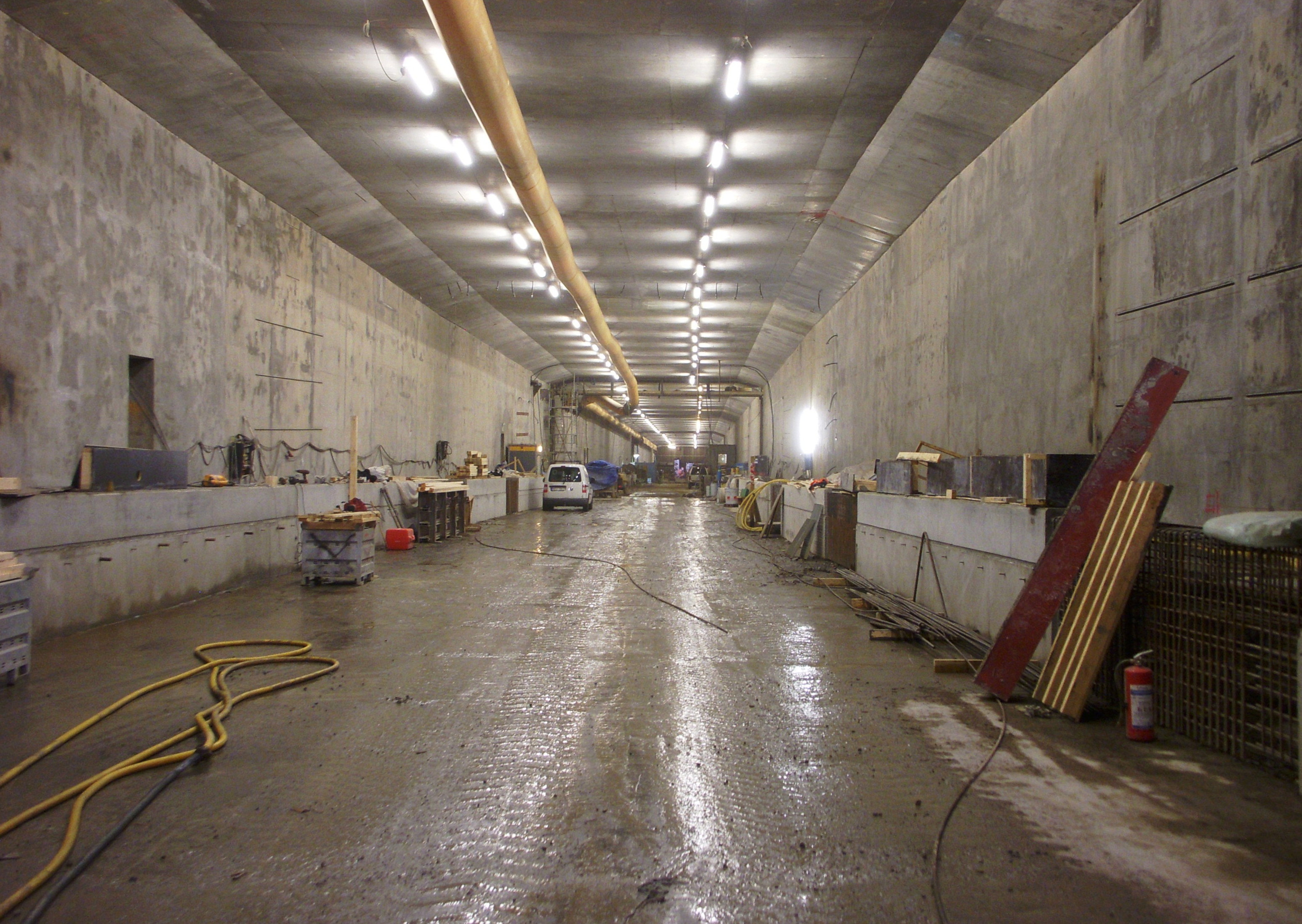 Söderströmstunneln, sänktunneldel under Riddarfjärden, vy mot norr